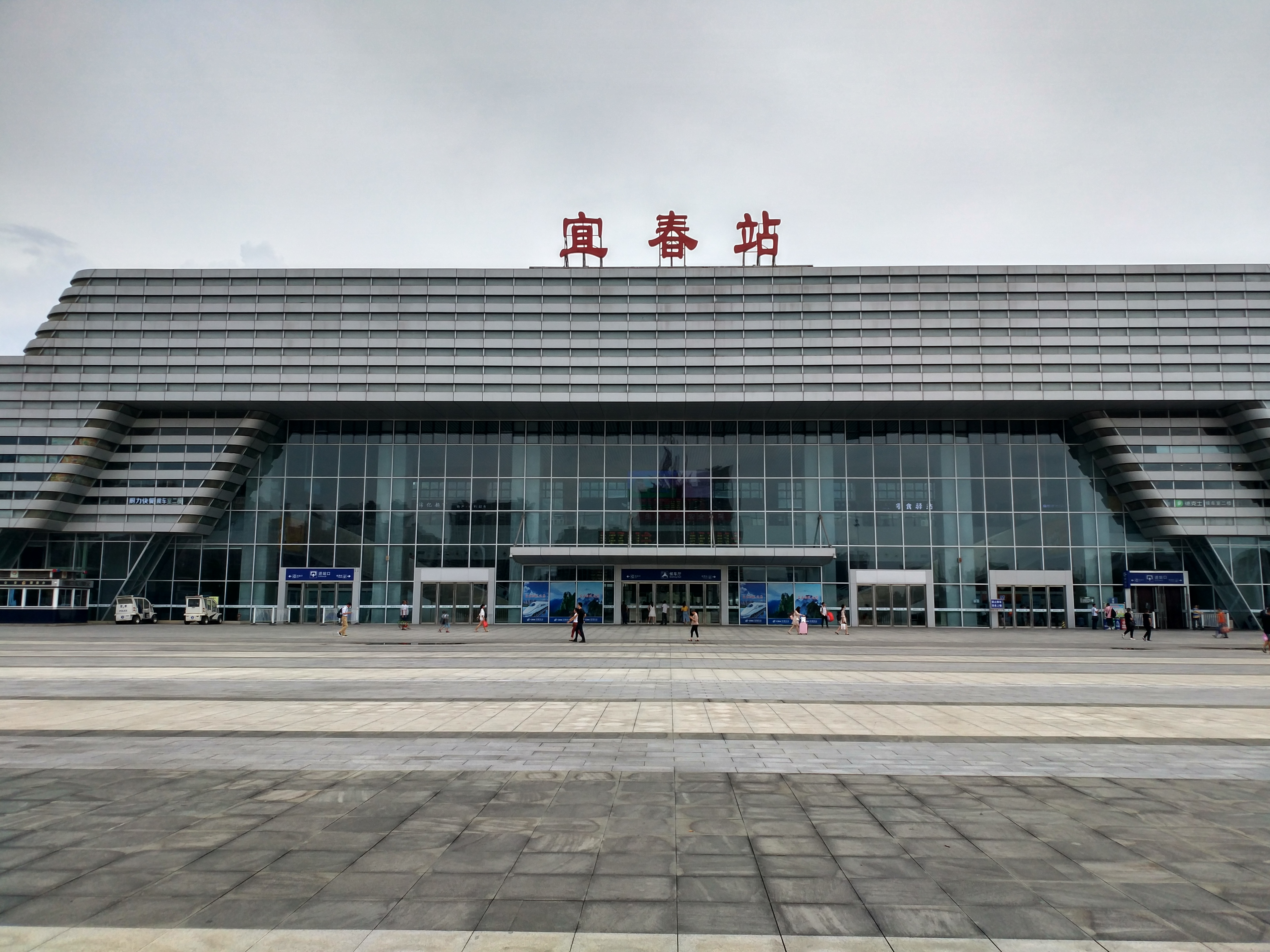 宜春站